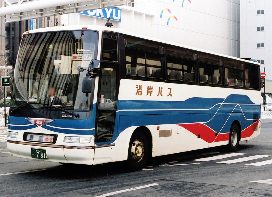 沿岸バス 日野・セレガGD U-RU2FTA